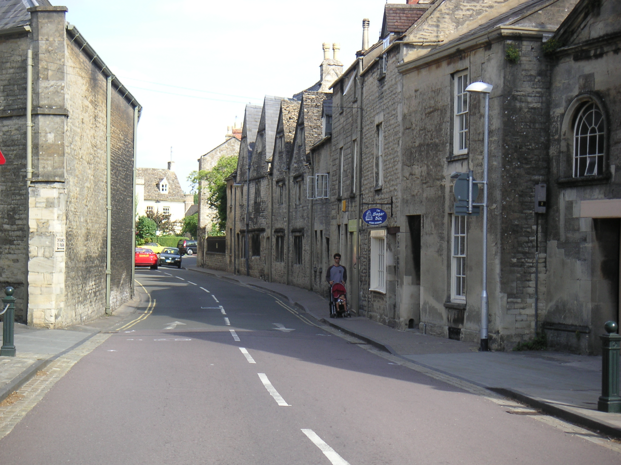 Beschreibung: A street in Cirencester